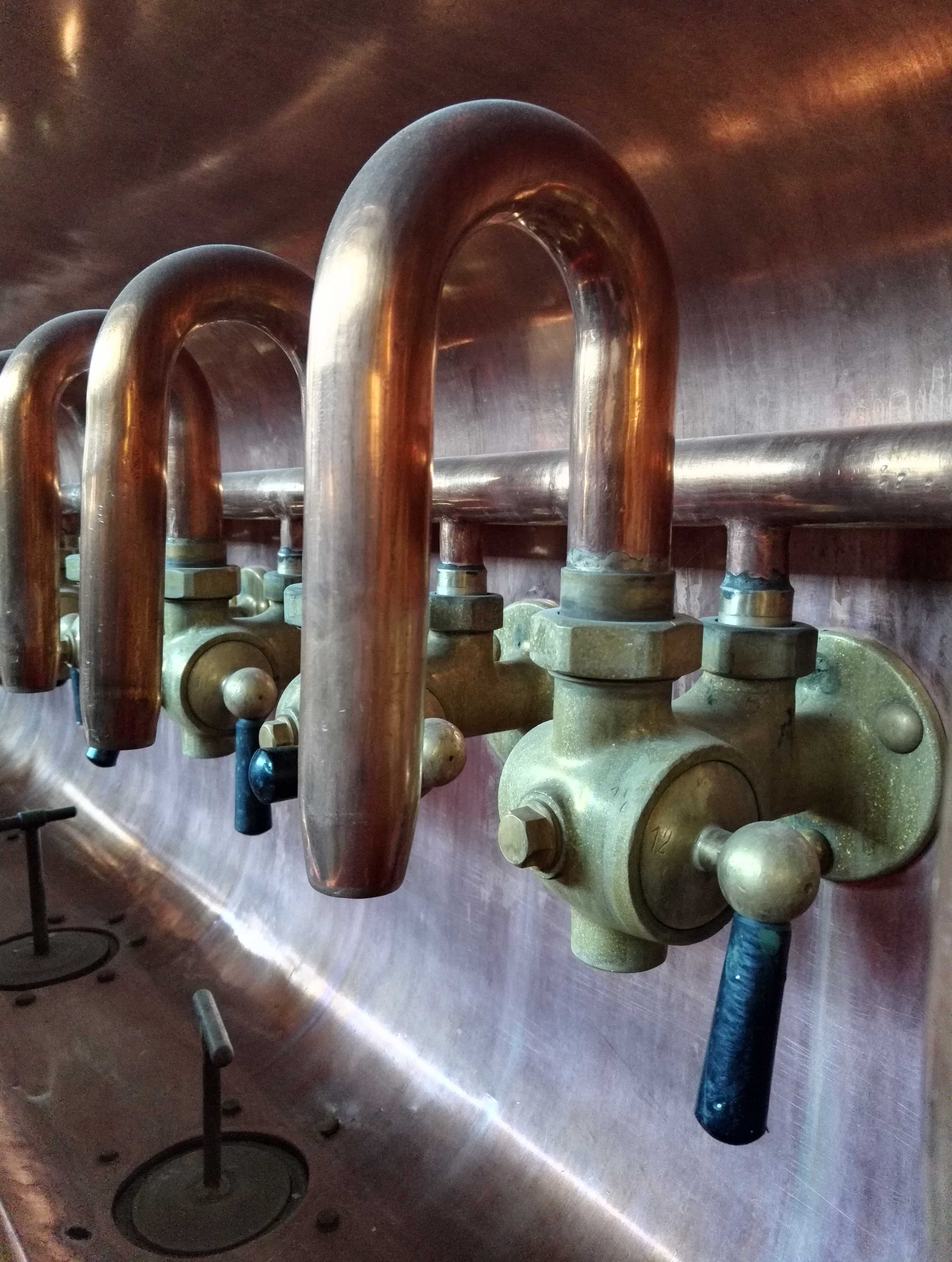 Koryto brzeczkowe, w browarze Lech, w Poznaniu